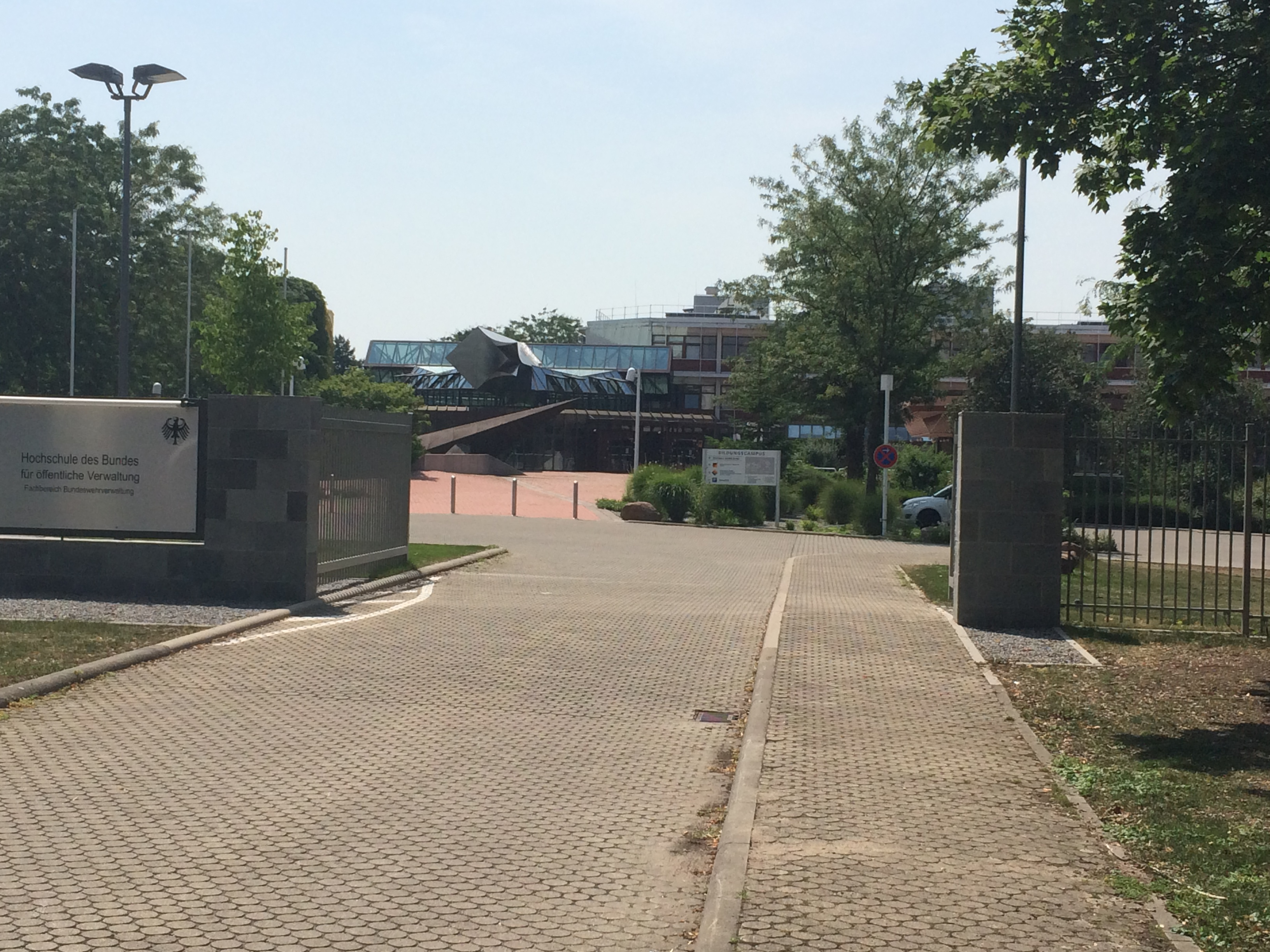 Hochschule der Bundeswehr für öffentliche Verwaltung, ein Bildungszentrum der Bundeswehr in Mannheim.